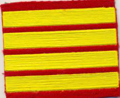 Курсовая нашивка (4 курс)